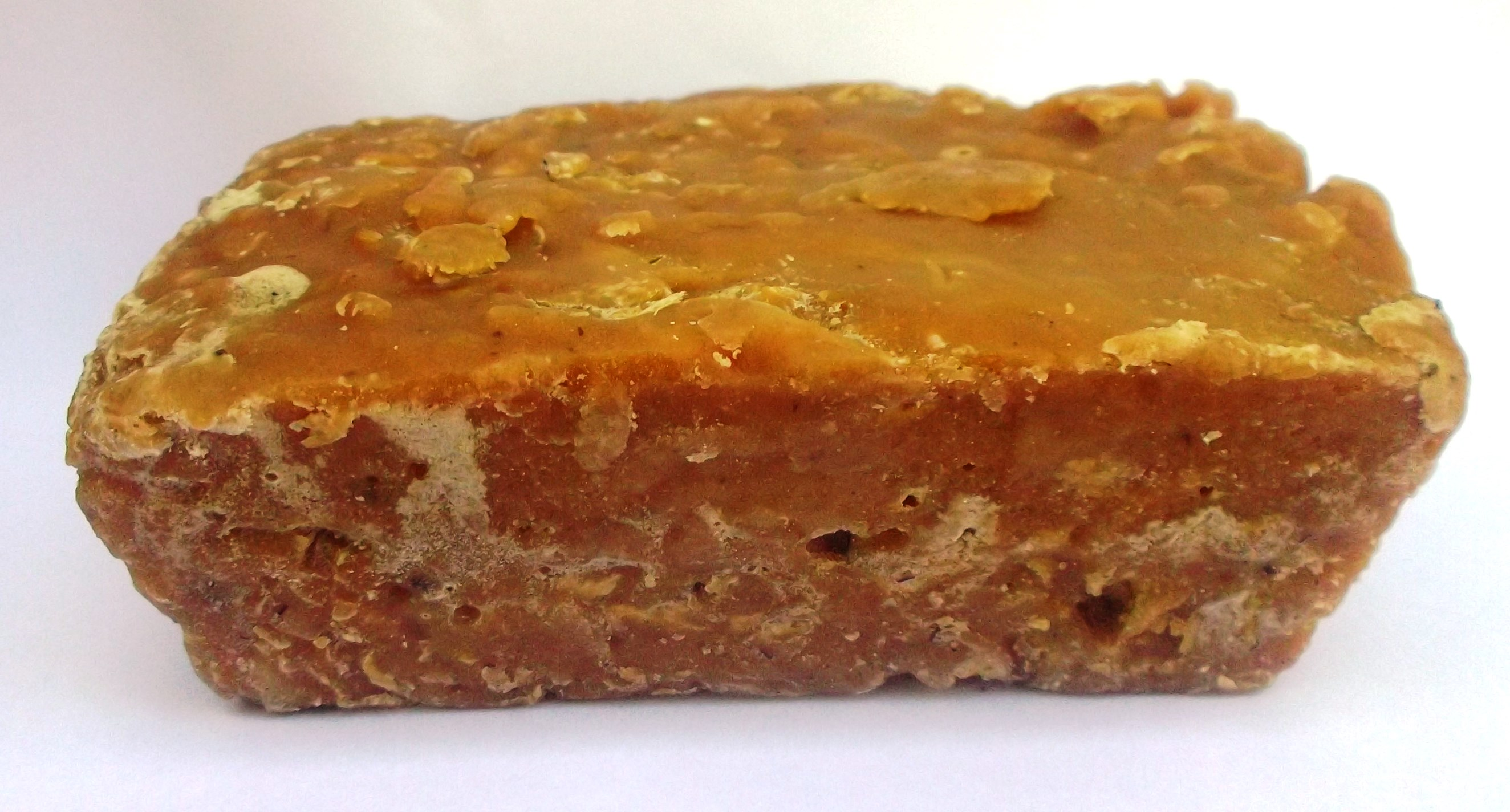 Uma rapadura artesanal de Boa Hora-Piauí